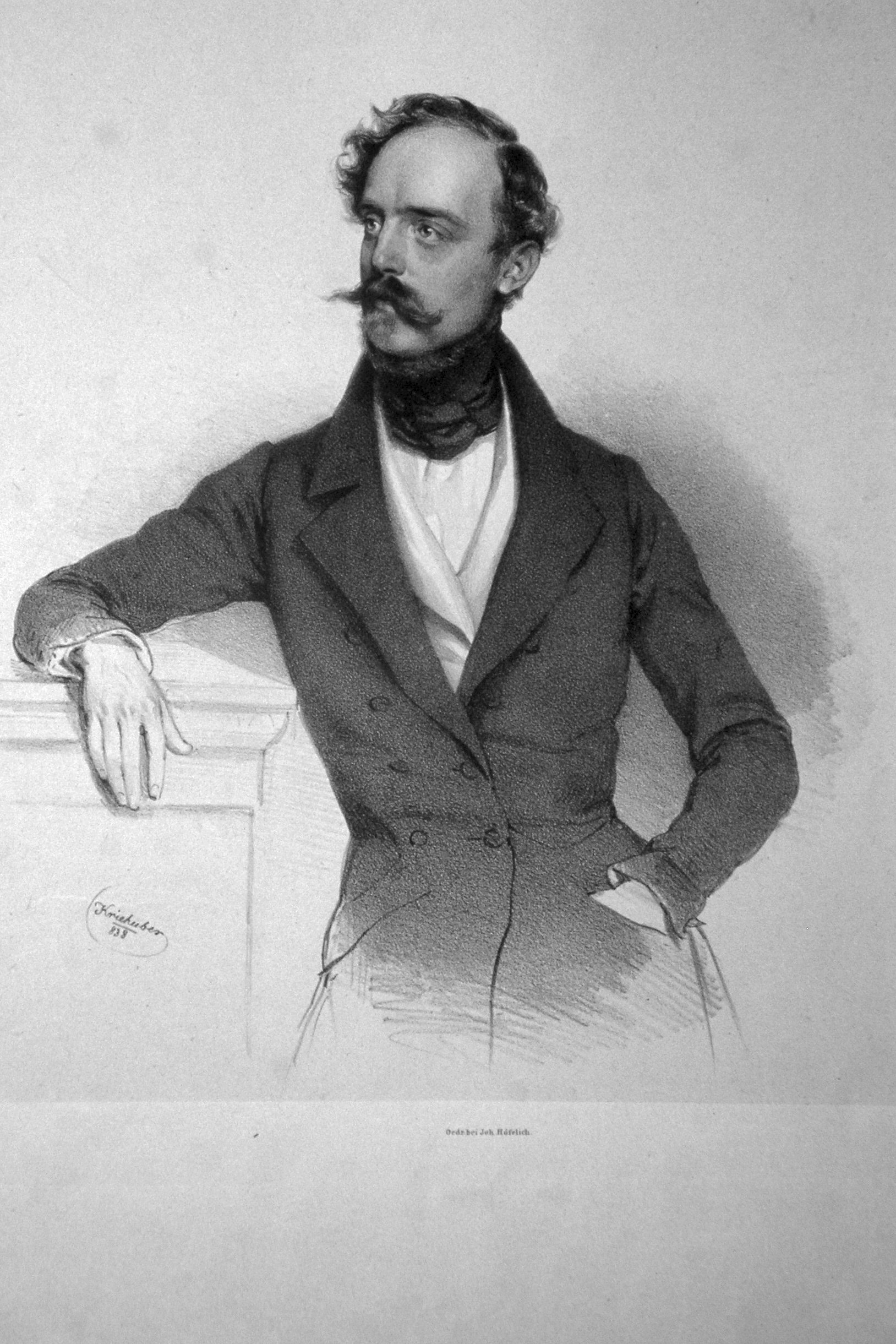 Anton Freiherr von Doblhoff-Dier (1800-1872), österreichischer Staatsmann. Lithographie von Josef Kriehuber, 1838